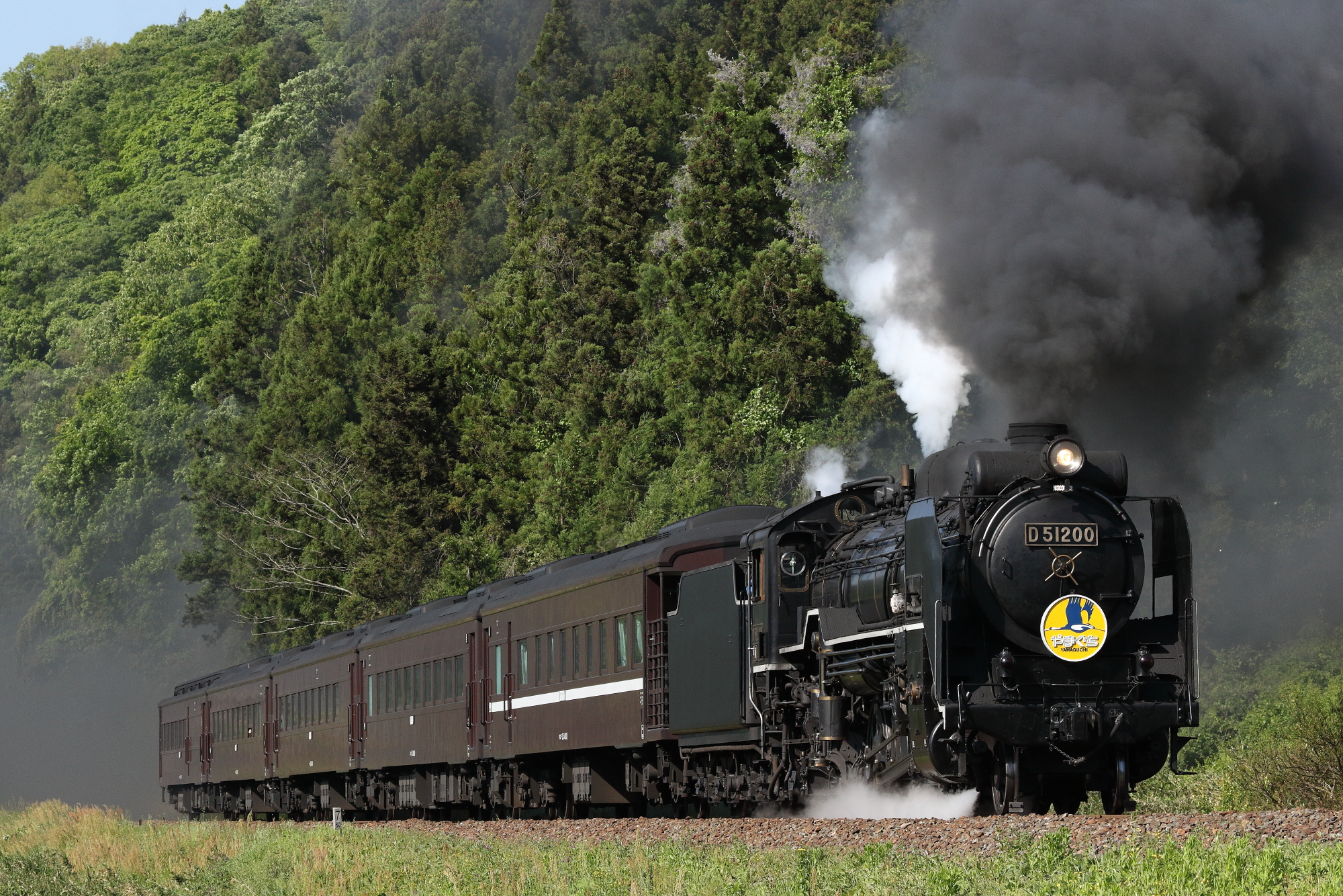 D51 200牽引SLやまぐち号(津和野―船平山)